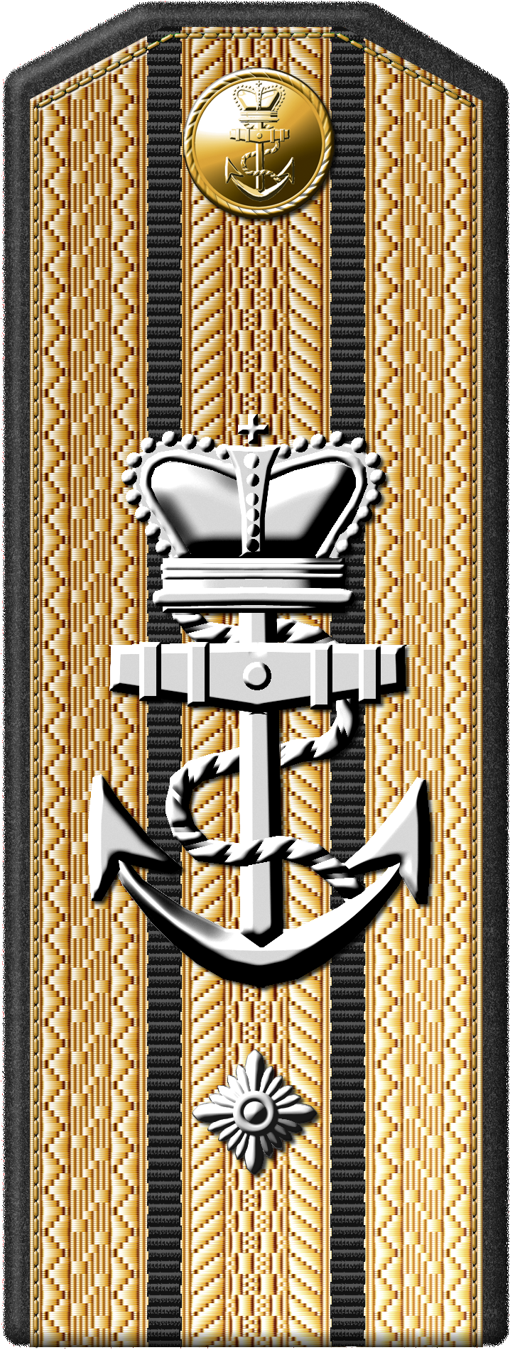 Болгарское княжество. Военный флот Знаки различия личного состава Военного флота образца 1891 г. Погон воинского звания «Лейтенант» Источники исходной информации: Закон "Об устройстве вооруженных сил Болгарского княжества", принятый VI обыкновенным народным собранием 3 декабря 1891 г., ч. 74, л. 39. Вычков А. Униформа болгарского военного флота 1879—1902. // Старый Цейхгауз. — №6(44) — 2011. — С. 34